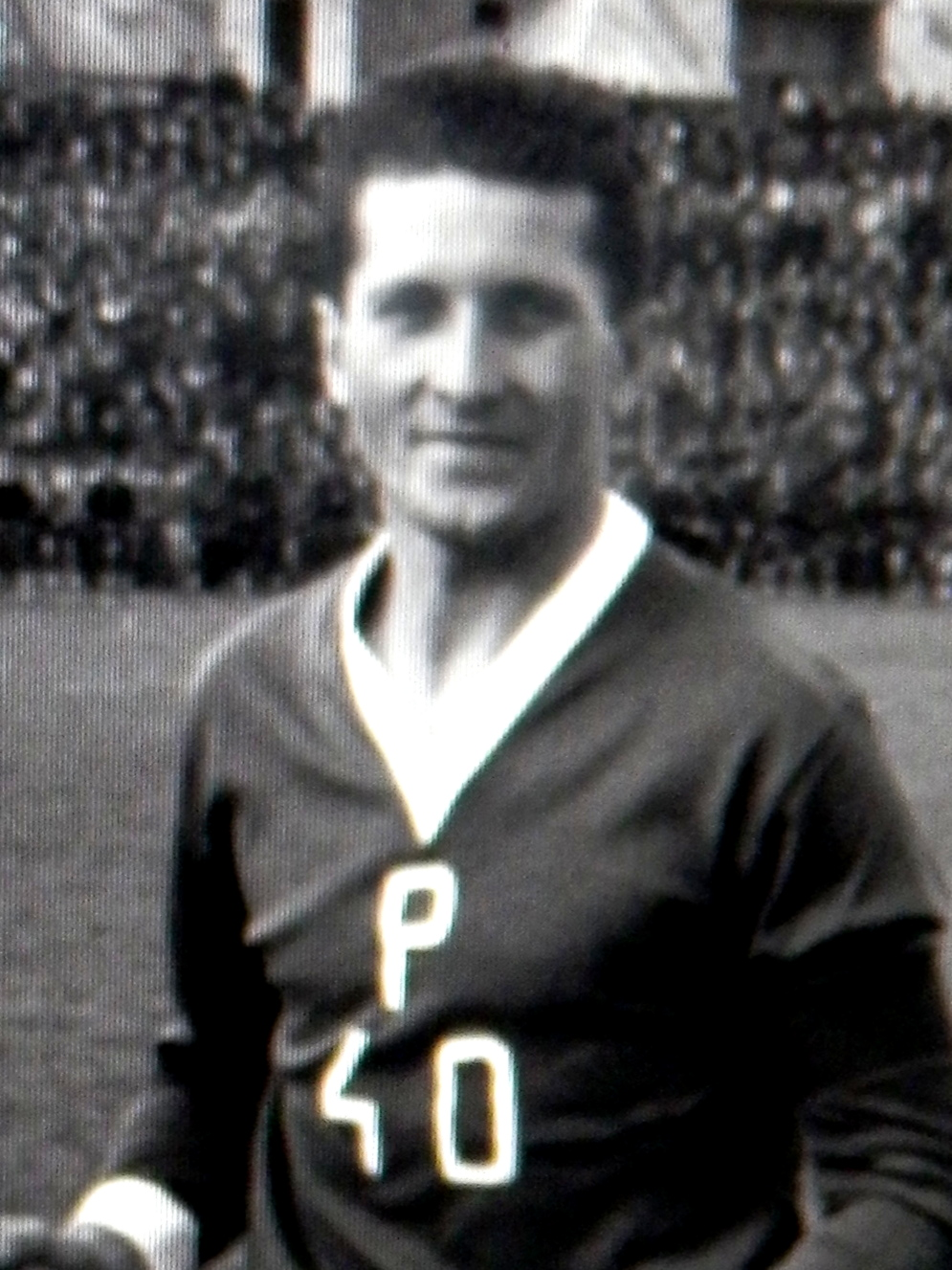 Digitalizácia historického obrázku.Futbalista Tatrana Prešov. Laco Pavlovič. Slovensko.